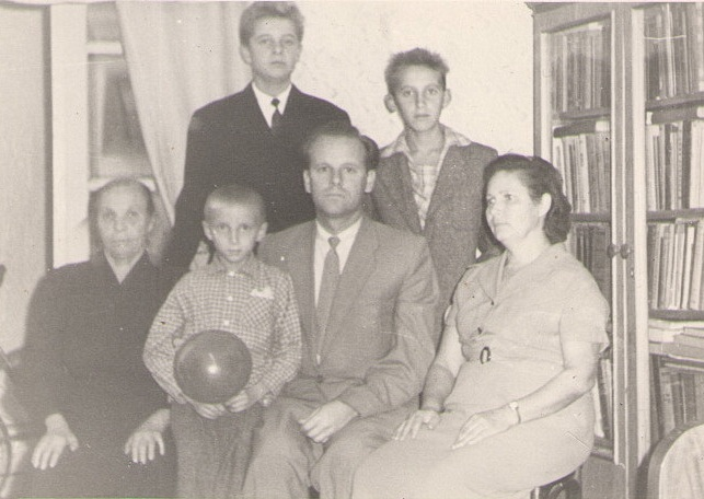 Семейное фото Константина Козловского.